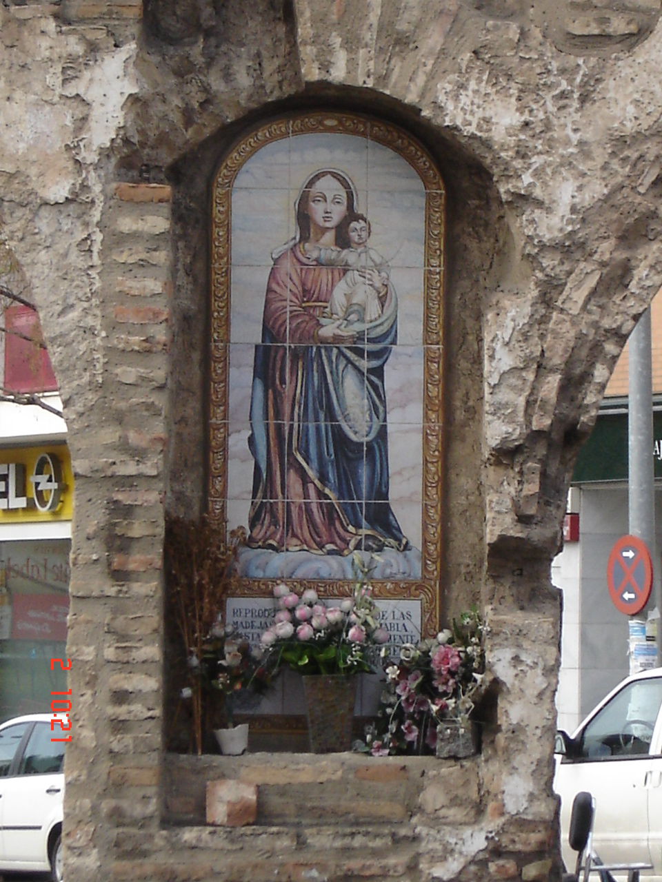 Hornacina donde se ubicaba una Virgen que fue saqueada de los restos del acueducto romano (la segunda arcada) conocido como "Caños de Carmona" de Sevilla.